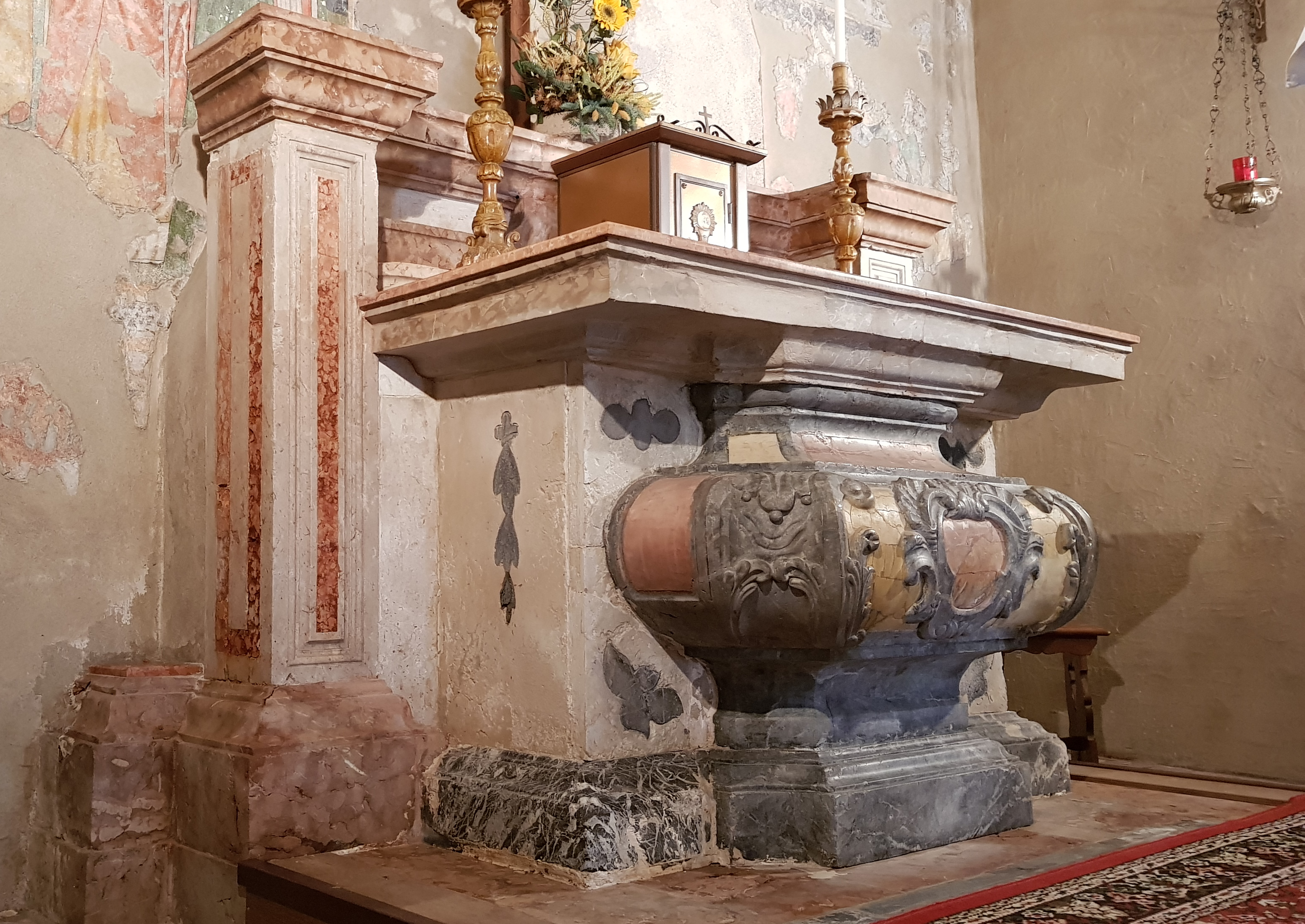 Altare in marmo policromo della Chiesa di Ognissanti di Ospedaletto di Gemona del Friuli. XVIII secolo